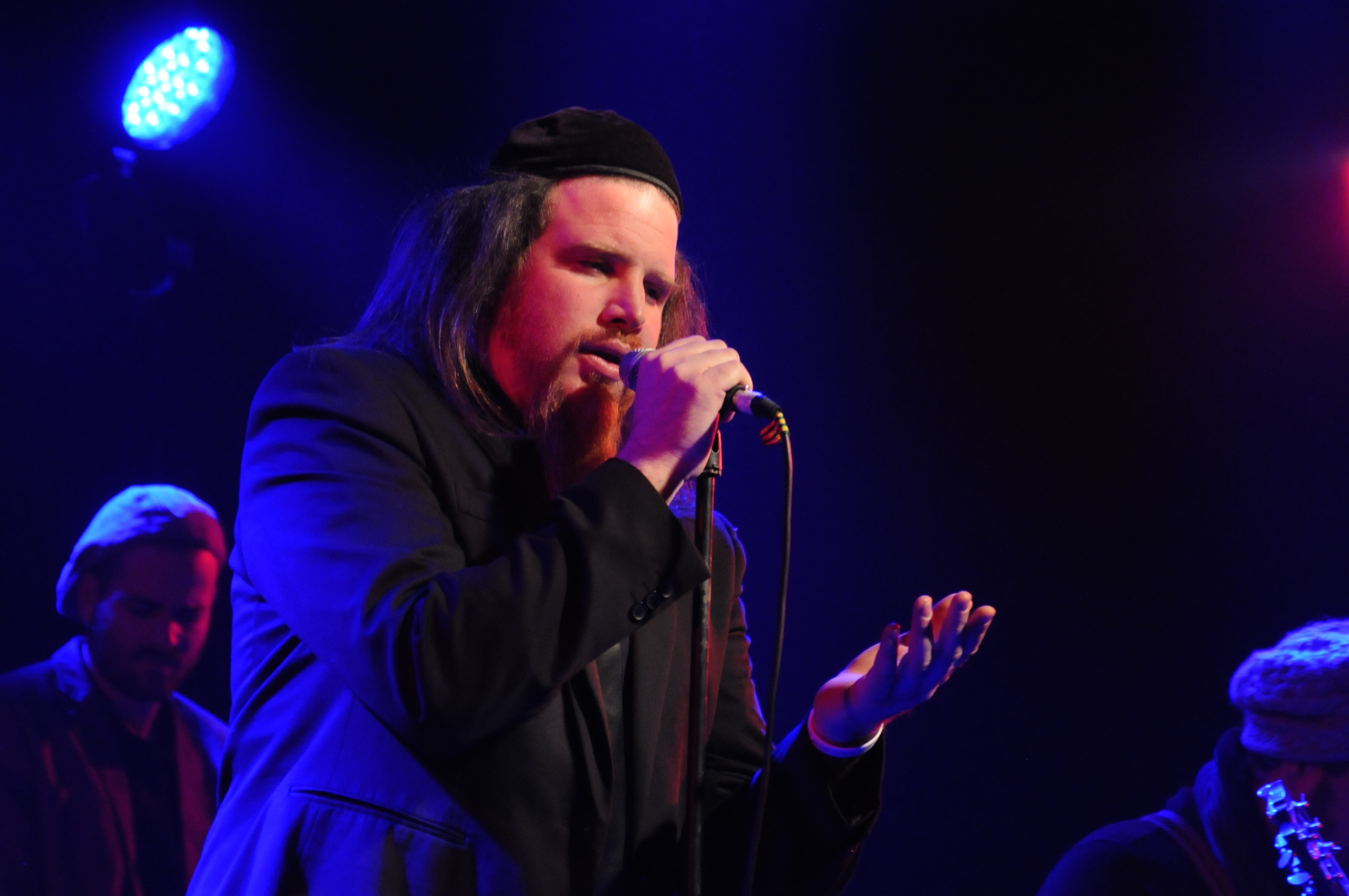 אליעזר בוצר מופיע בבארבי, 24 בדצמבר 2013